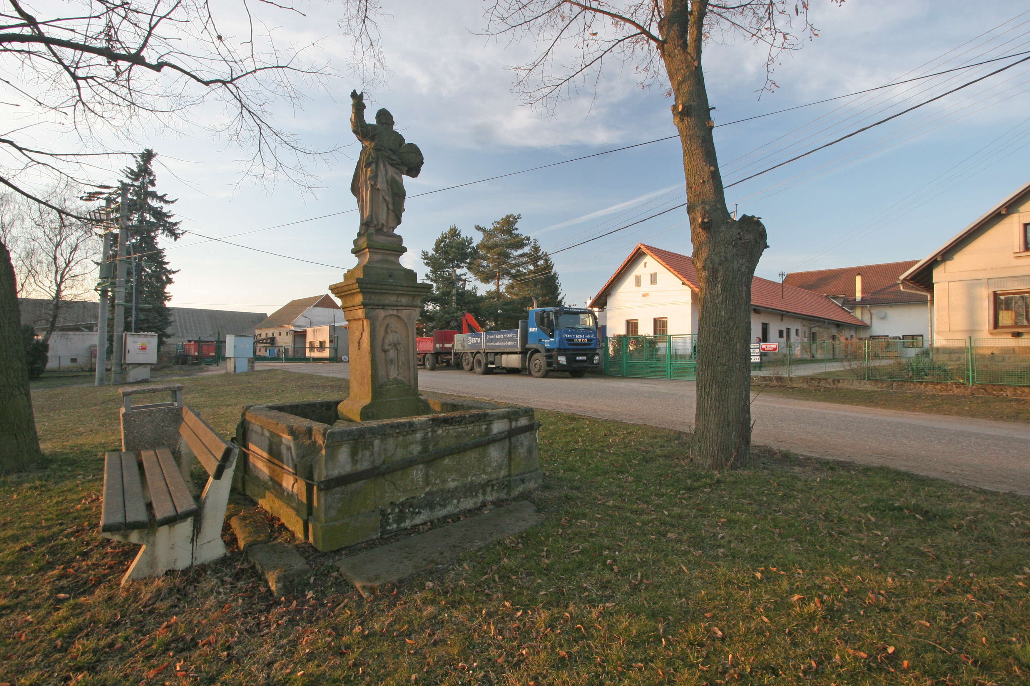 Chomutičky socha na návsi